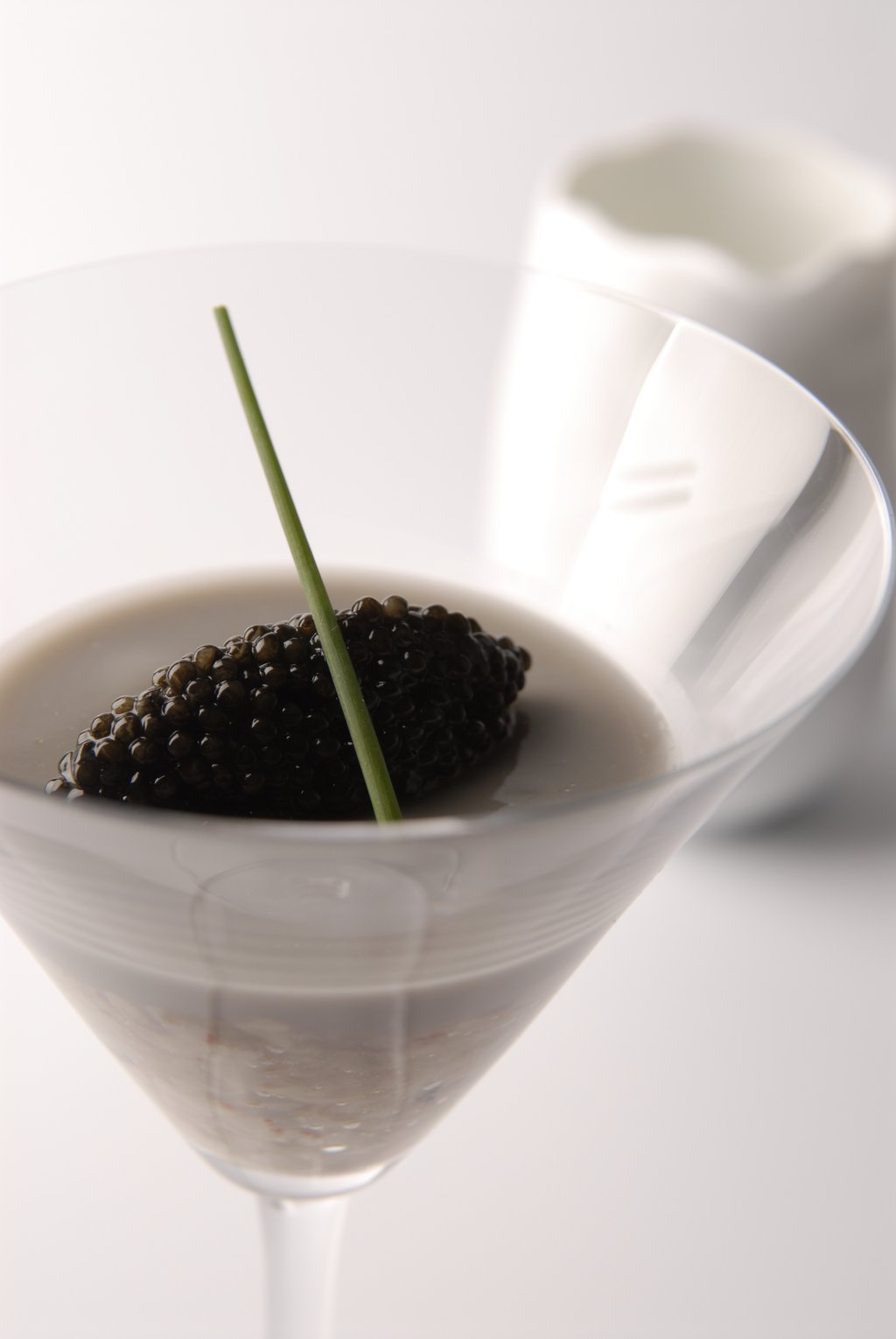 Tartare huitre caviar du grand chef cuisinier Hélène Darroze de Paris